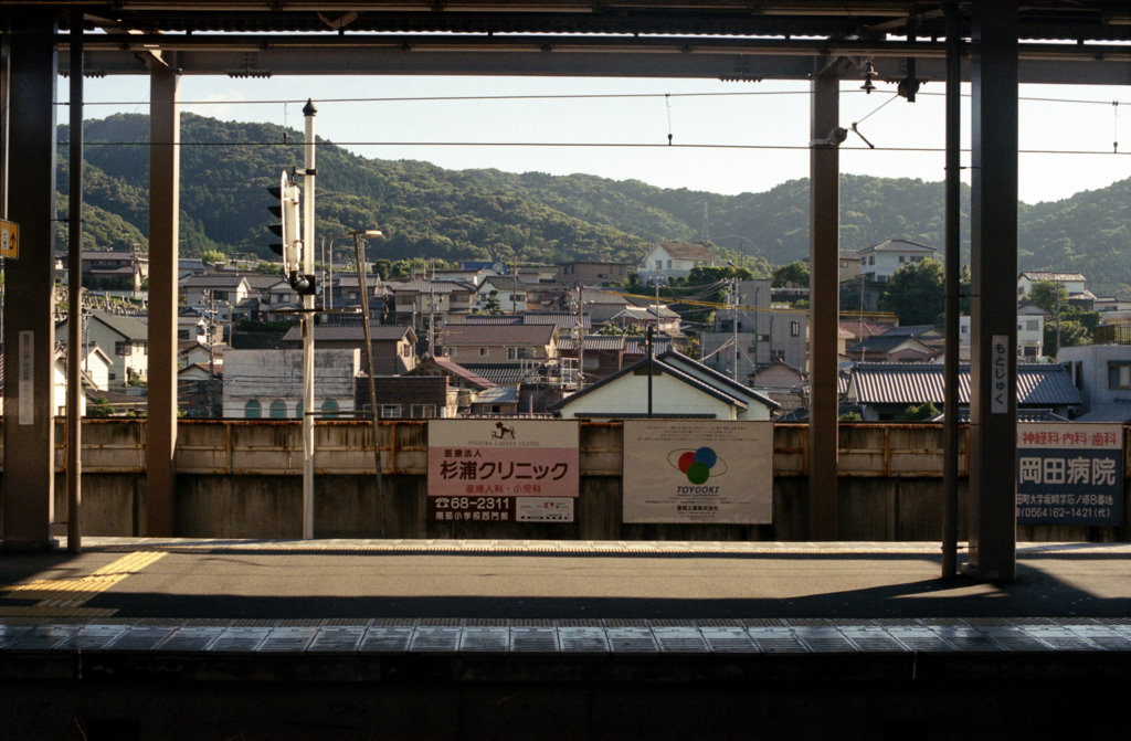 本宿駅